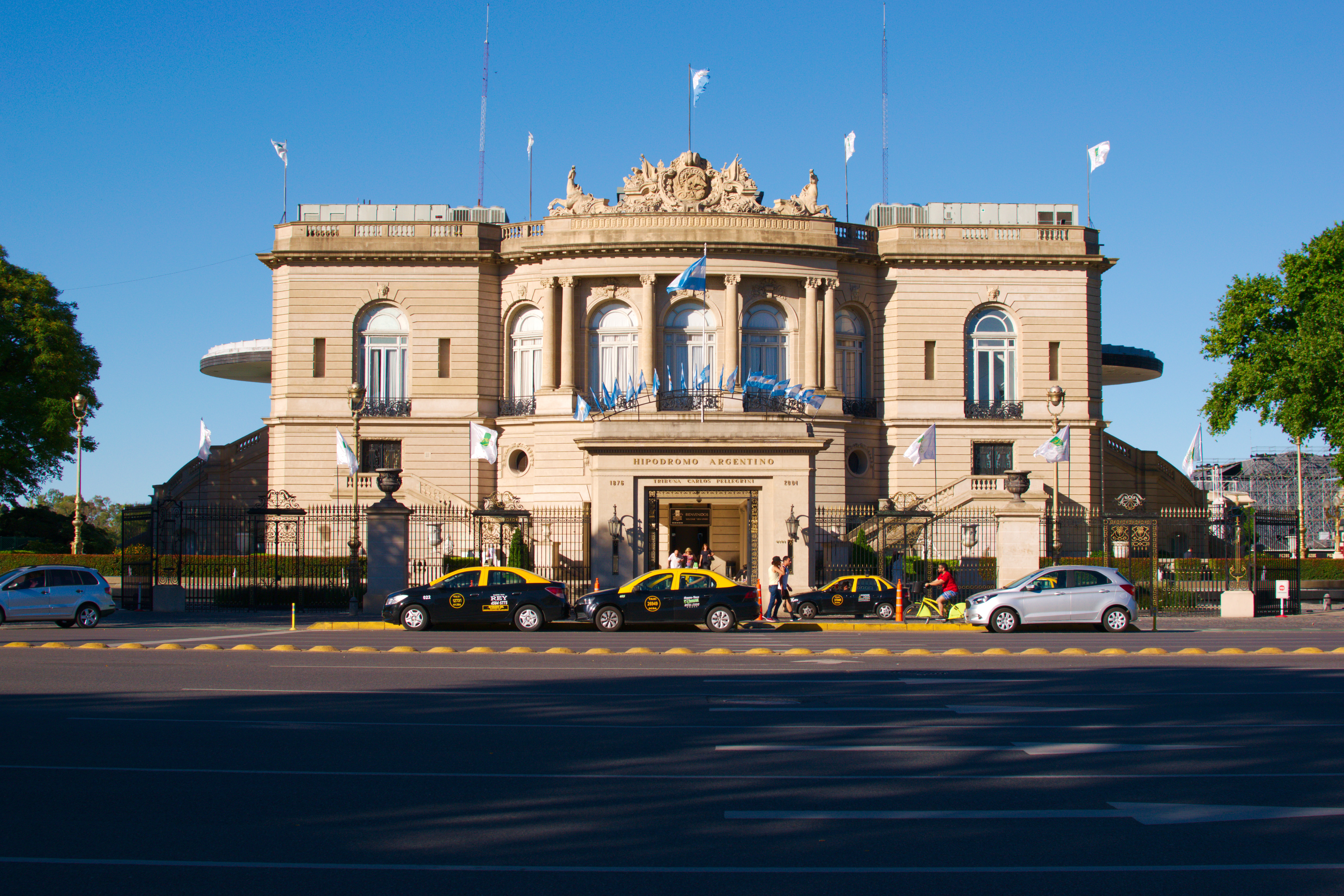 Entrada al Hipódromo Argentino en el barrio de Palermo (Buenos Aires)